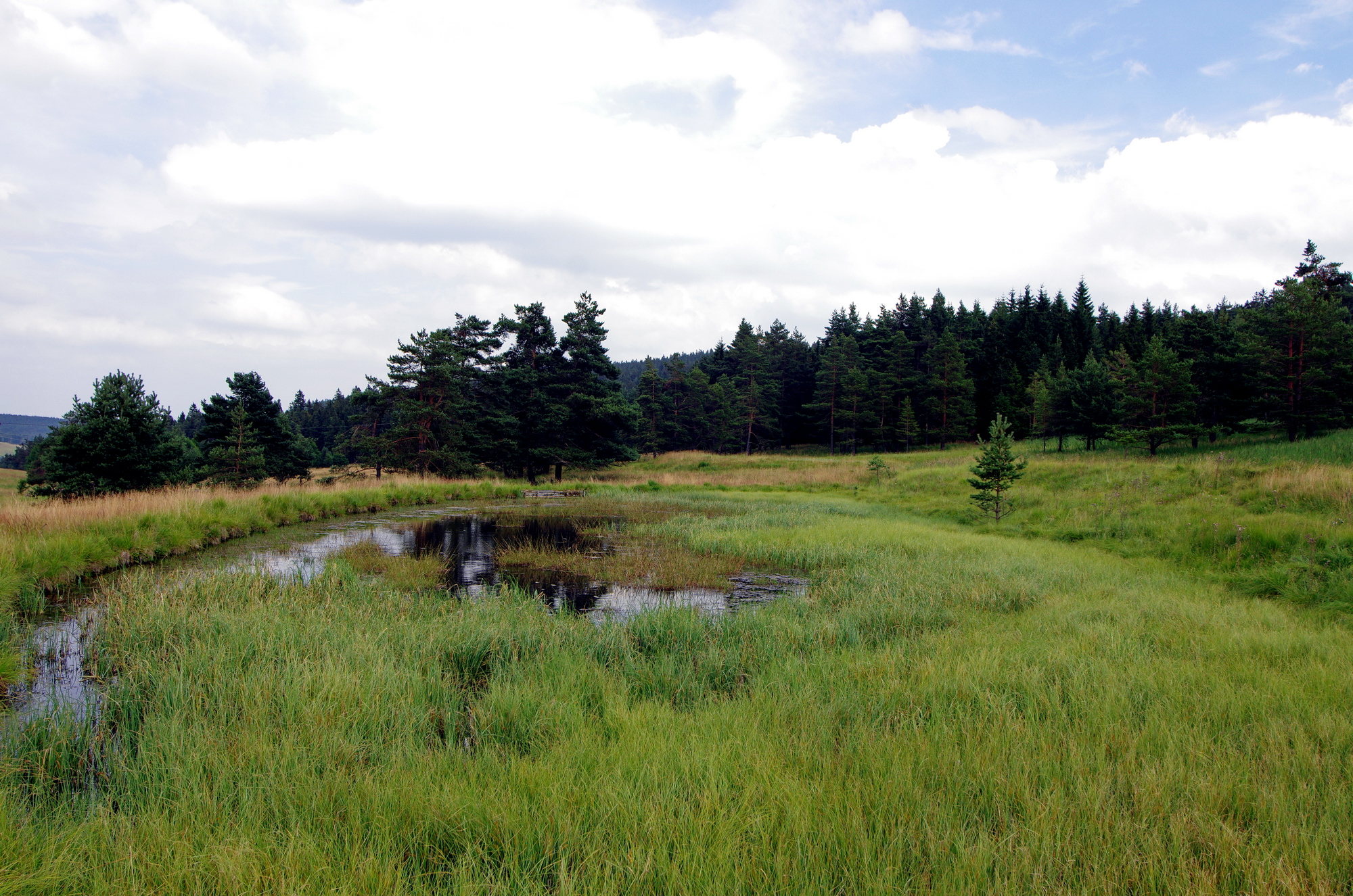 Přírodní rezervace Mokřady pod Vlčkem, Slavkovský les, okres Cheb